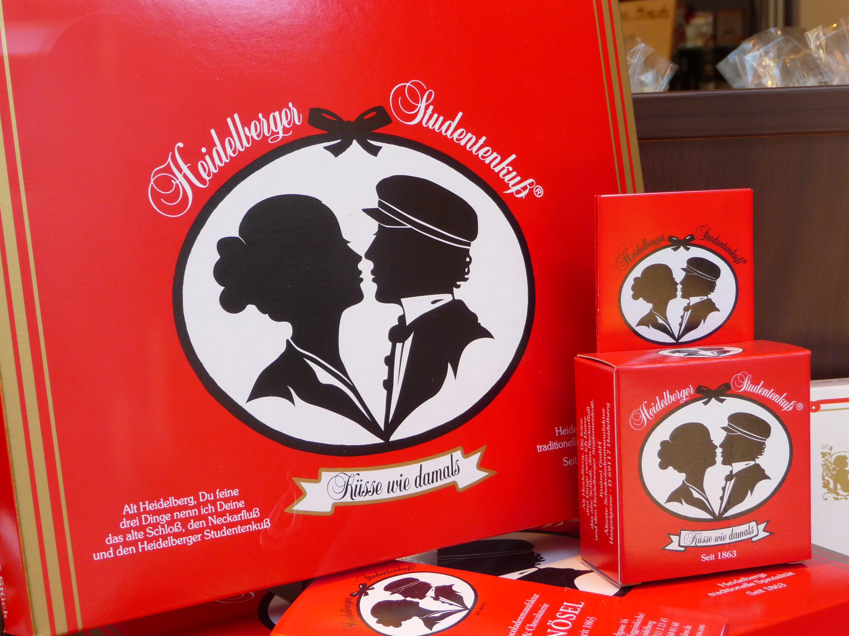 Verkaufsverpackung des "Heidelberger Studentenkuss", fotografiert in einer Chocolaterie in Heidelberg (Baden-Württemberg, Deutschland)